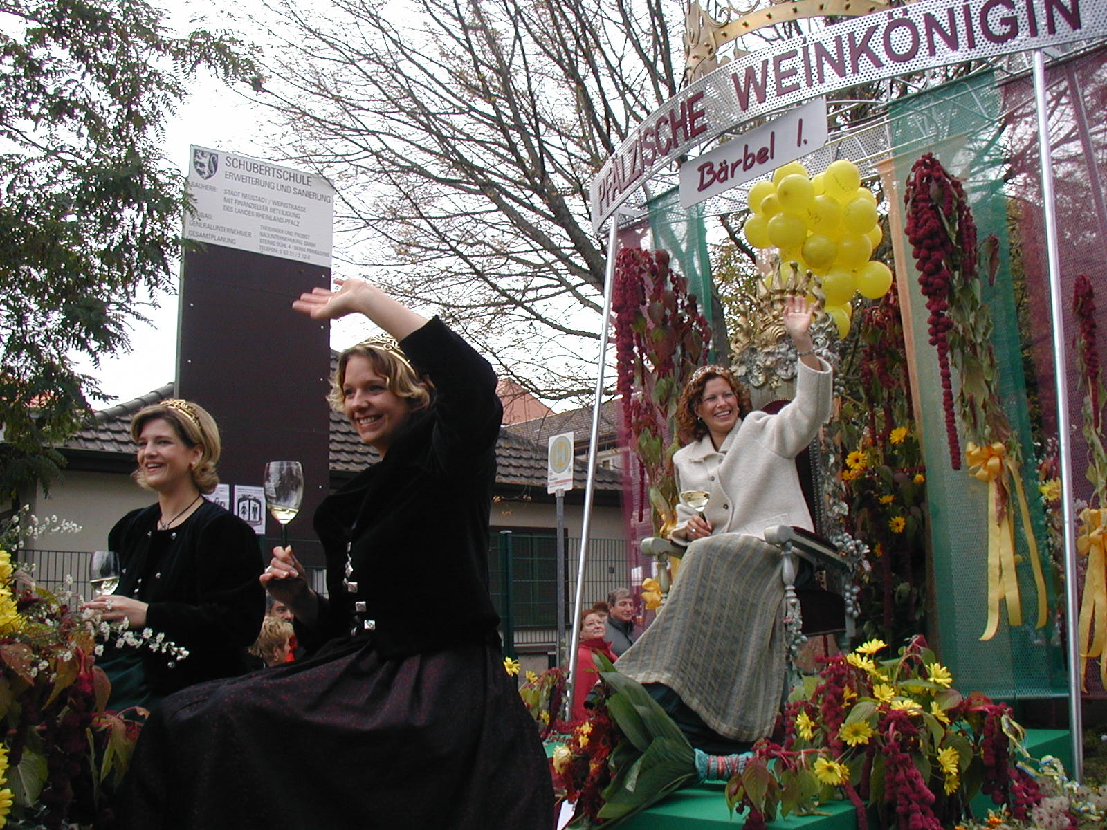 Die Pfälzische Weinkönigin beim Neustadter Winzerfestzug mit ihren Prinzessinnen